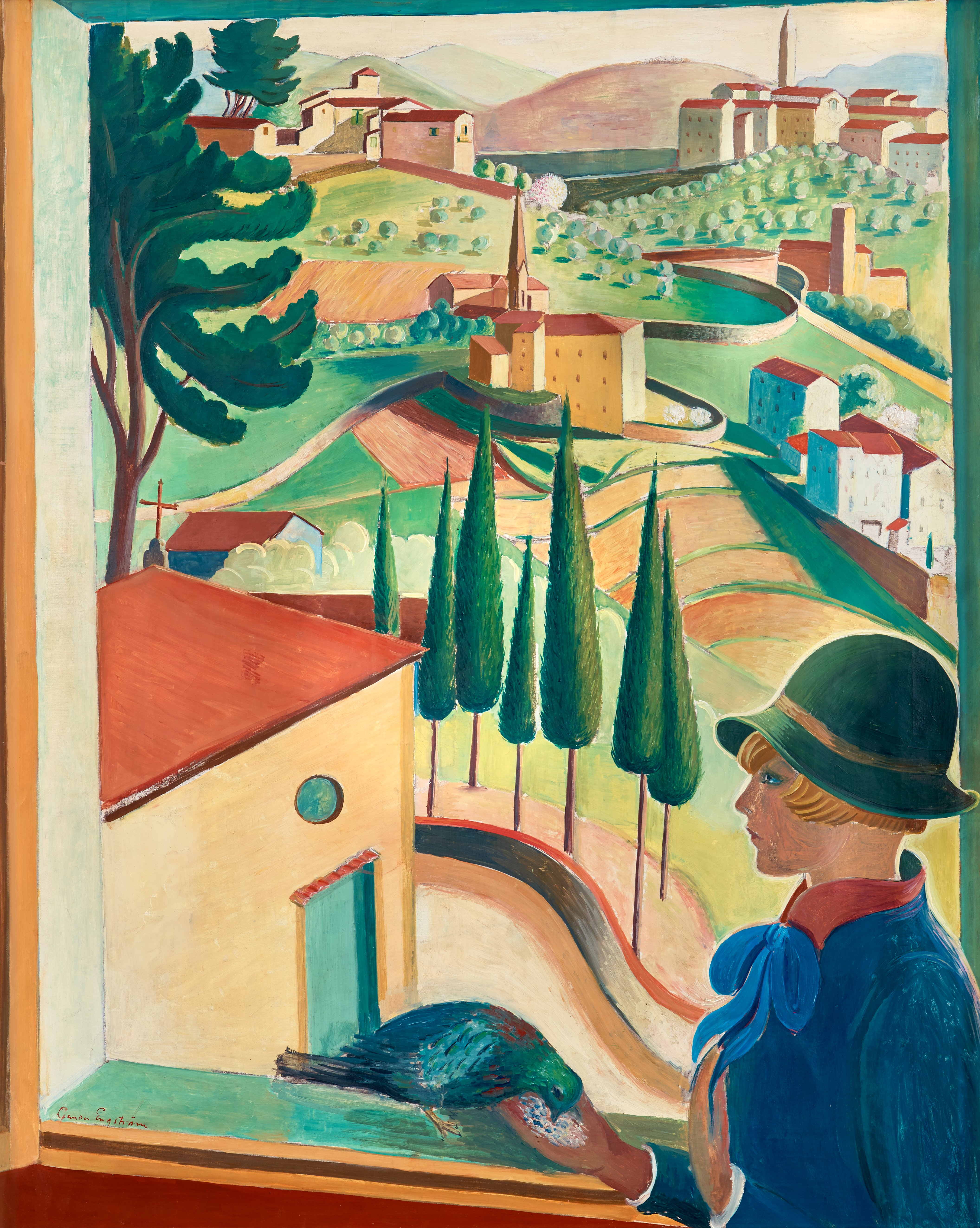 Den givmilde gossen